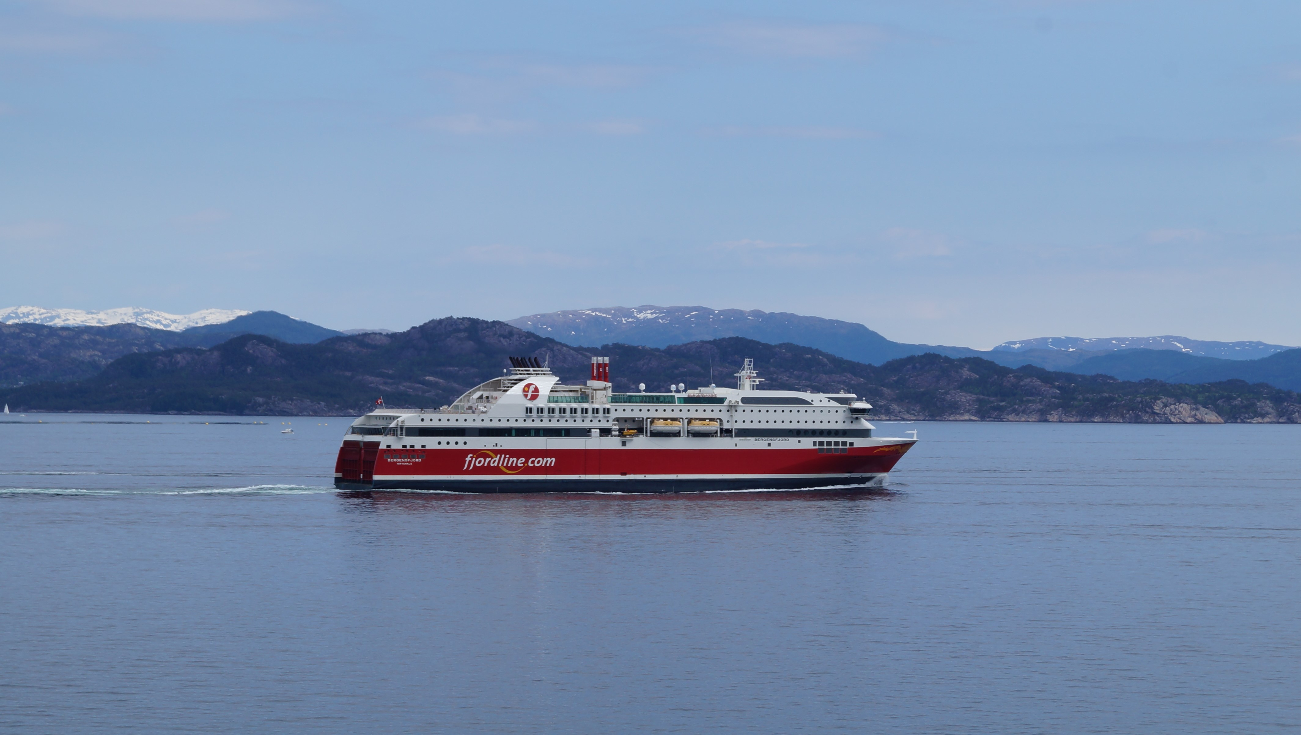 «Bergensfjord» i Korsfjorden